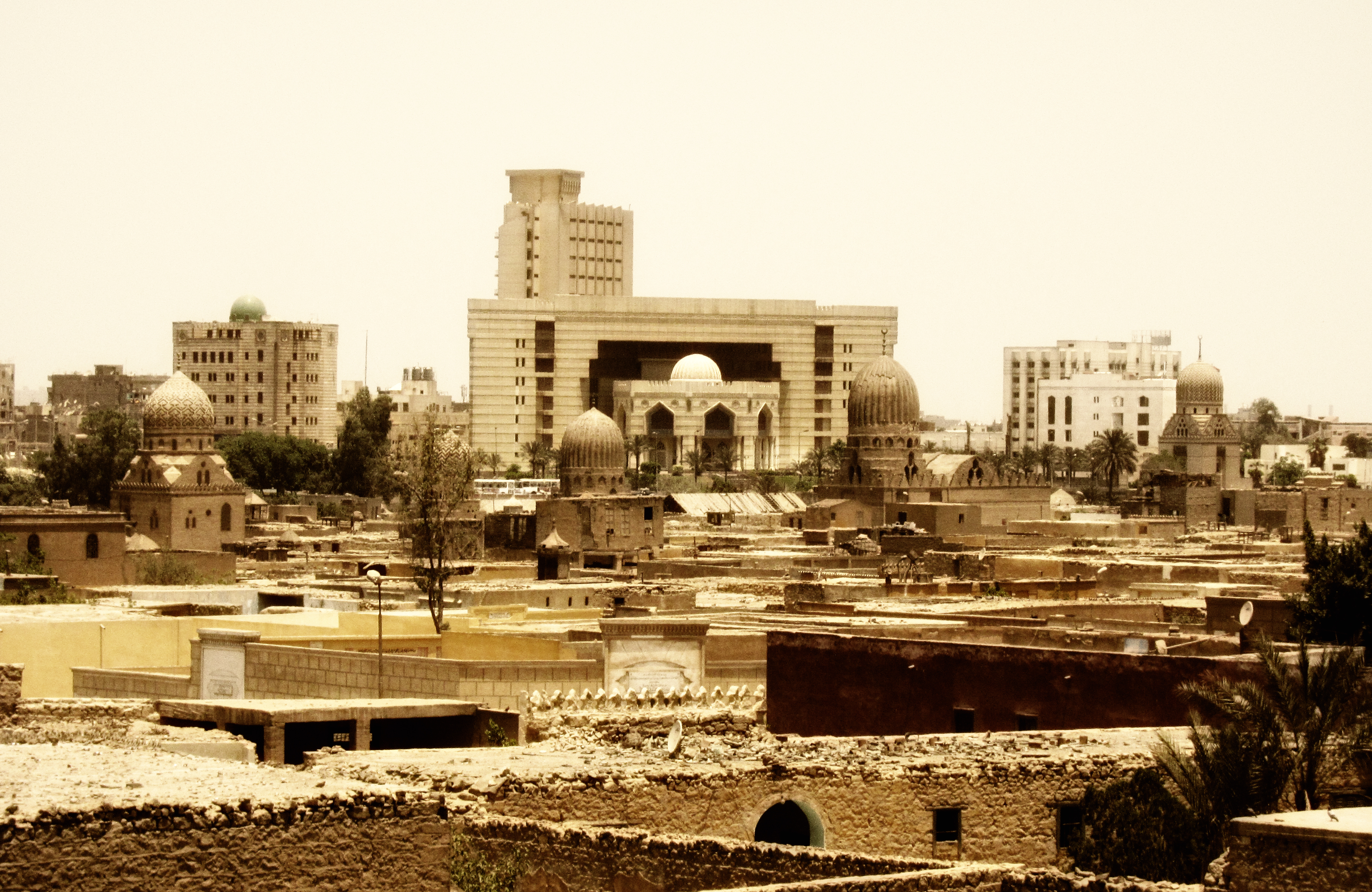 Mashyakhat Al-Azhar مشيخة الأزهر / Cairo / Egypt - 28 05 2010